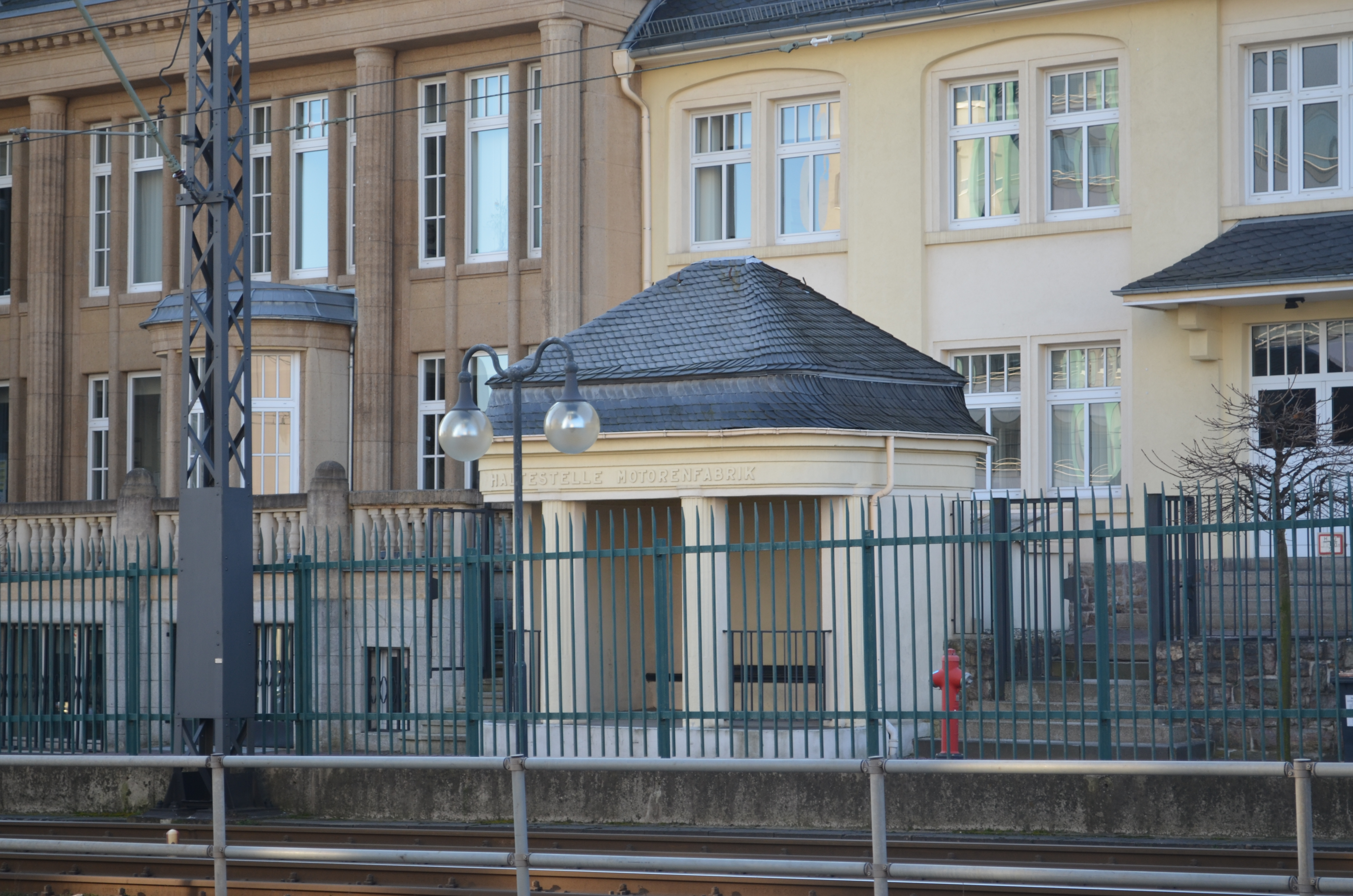 Oberursel, Motorenfabrik Oberursel, Straßenbahnhäuschen